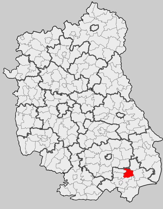 Map of gmina Rachanie, Tomaszów Lubelski county, Lublin voivodship Mapa gminy Rachanie, powiat tomaszowski, województwo lubelskie